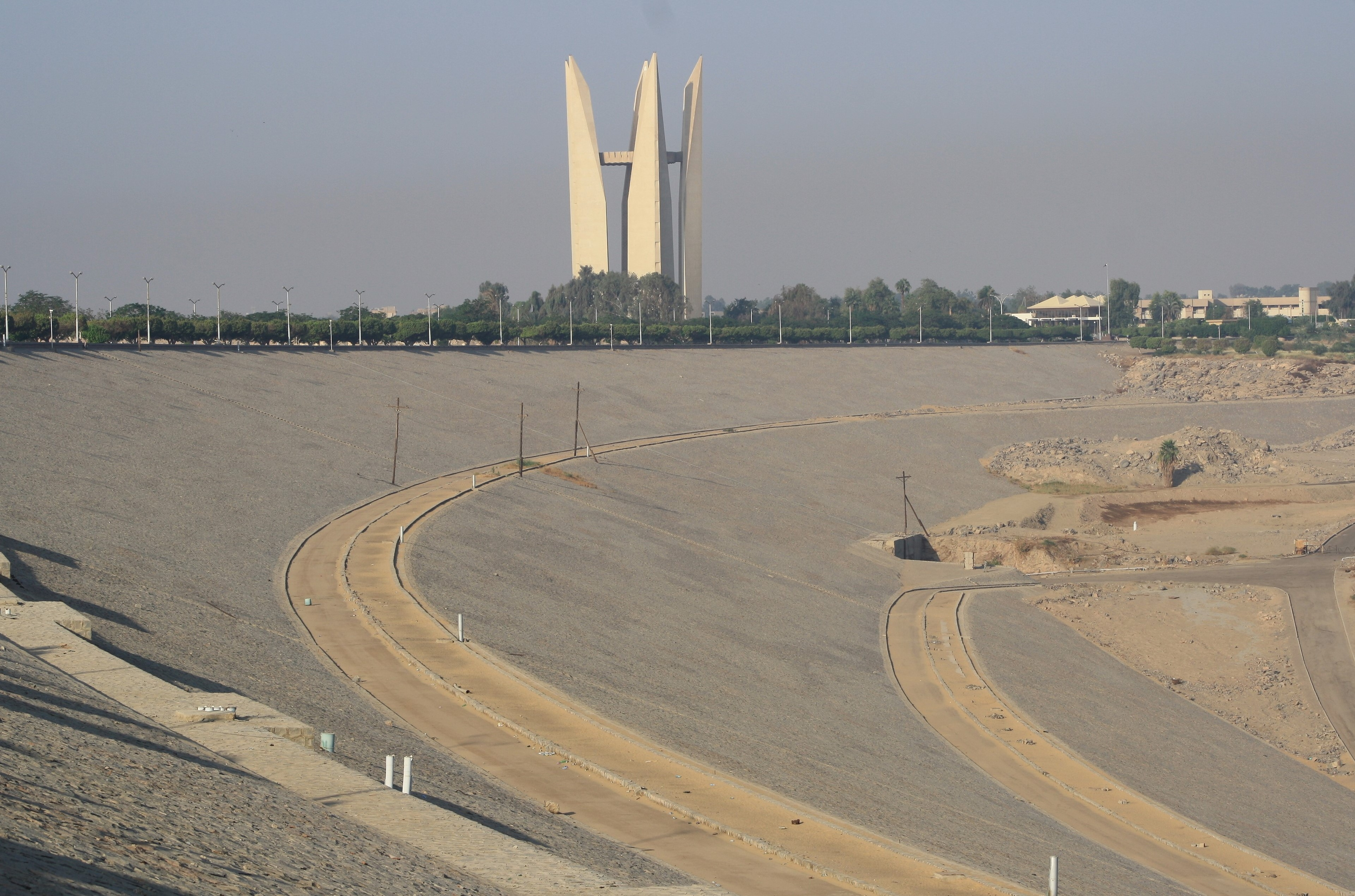 Assuan-Staudamm